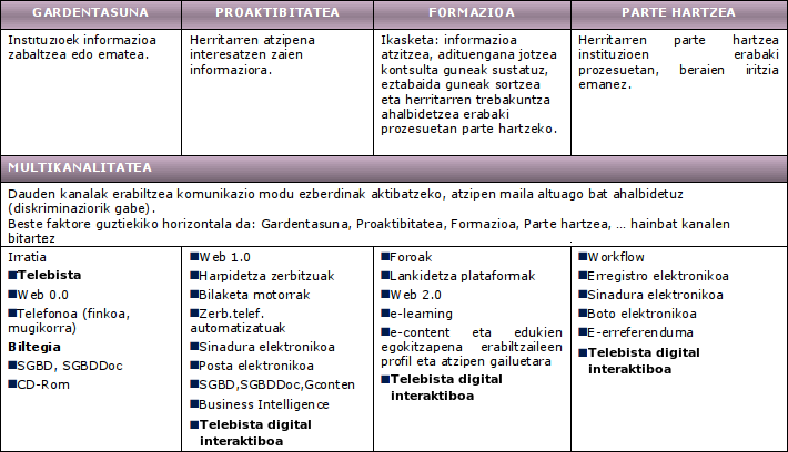 IKTen sailkapena e-demokrazia sustatzen duten faktore nagusien arabera.